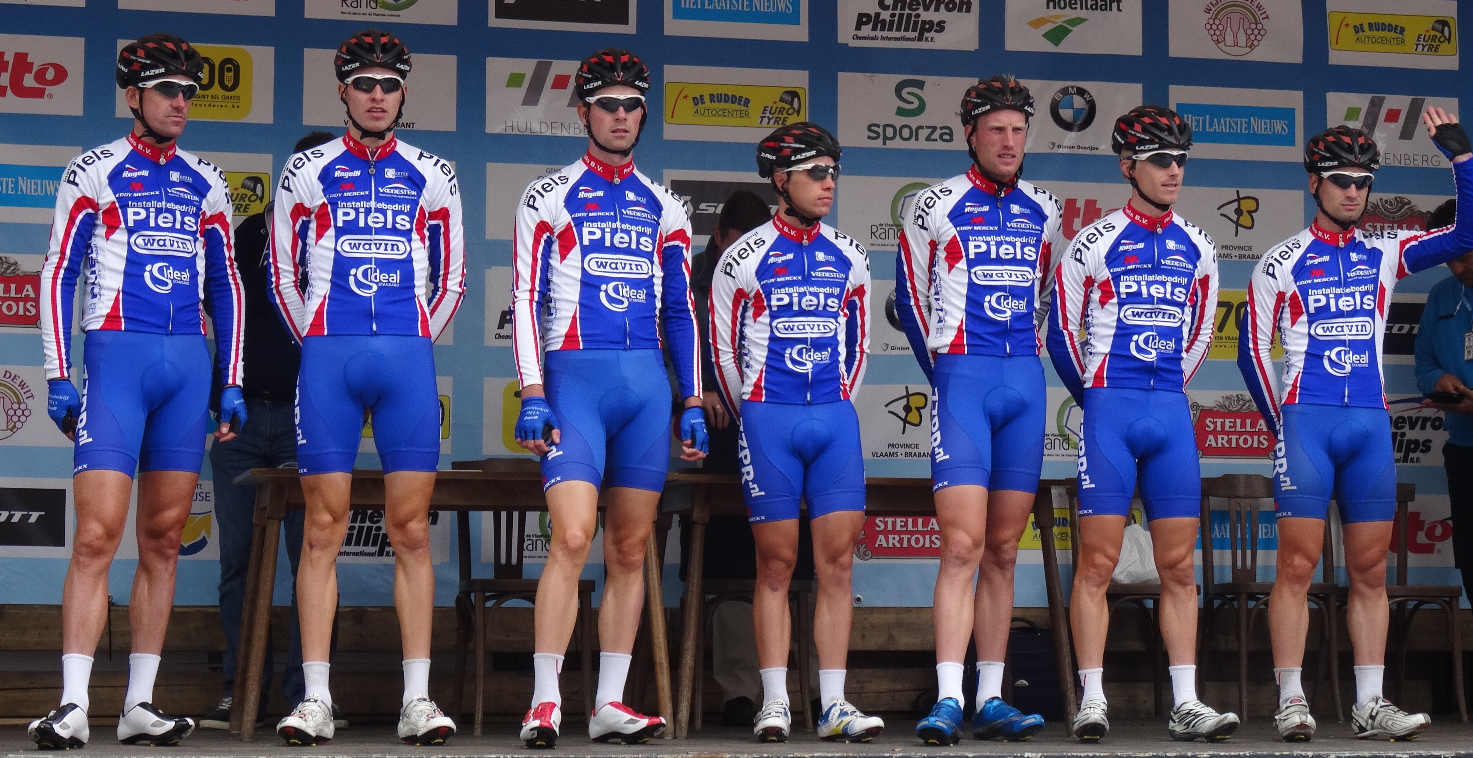 Reportage photographique réalisé le mercredi 27 août à l'occasion du départ de la Druivenkoers Overijse 2014 à Huldenberg, Belgique.